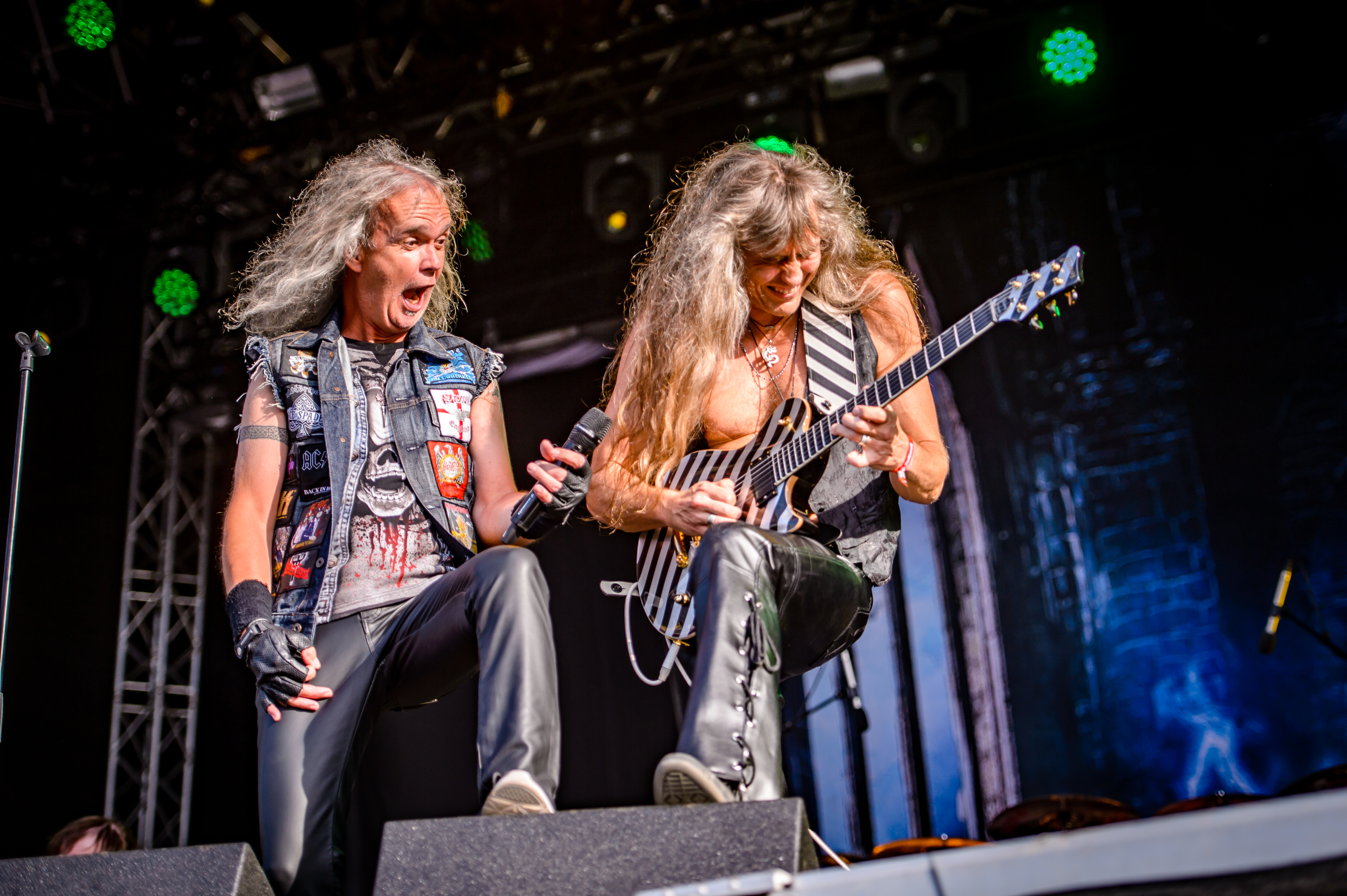 'RockHarz Open Air 2017; Ballenstedt': 'Grave Digger'